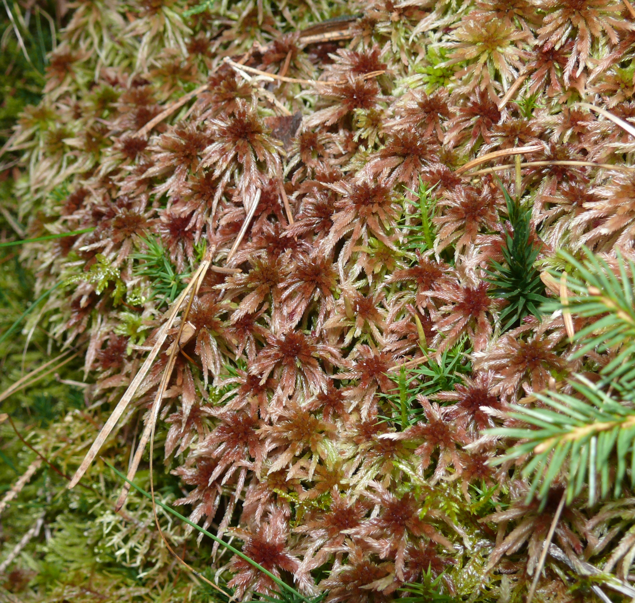 Sphagnum quinquefarium, Schwäbisch-Fränkische Waldberge, Germany